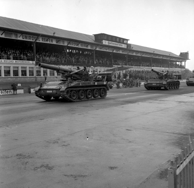 20 Jahre NATO. Bundeswehrparade auf dem Nürburgring